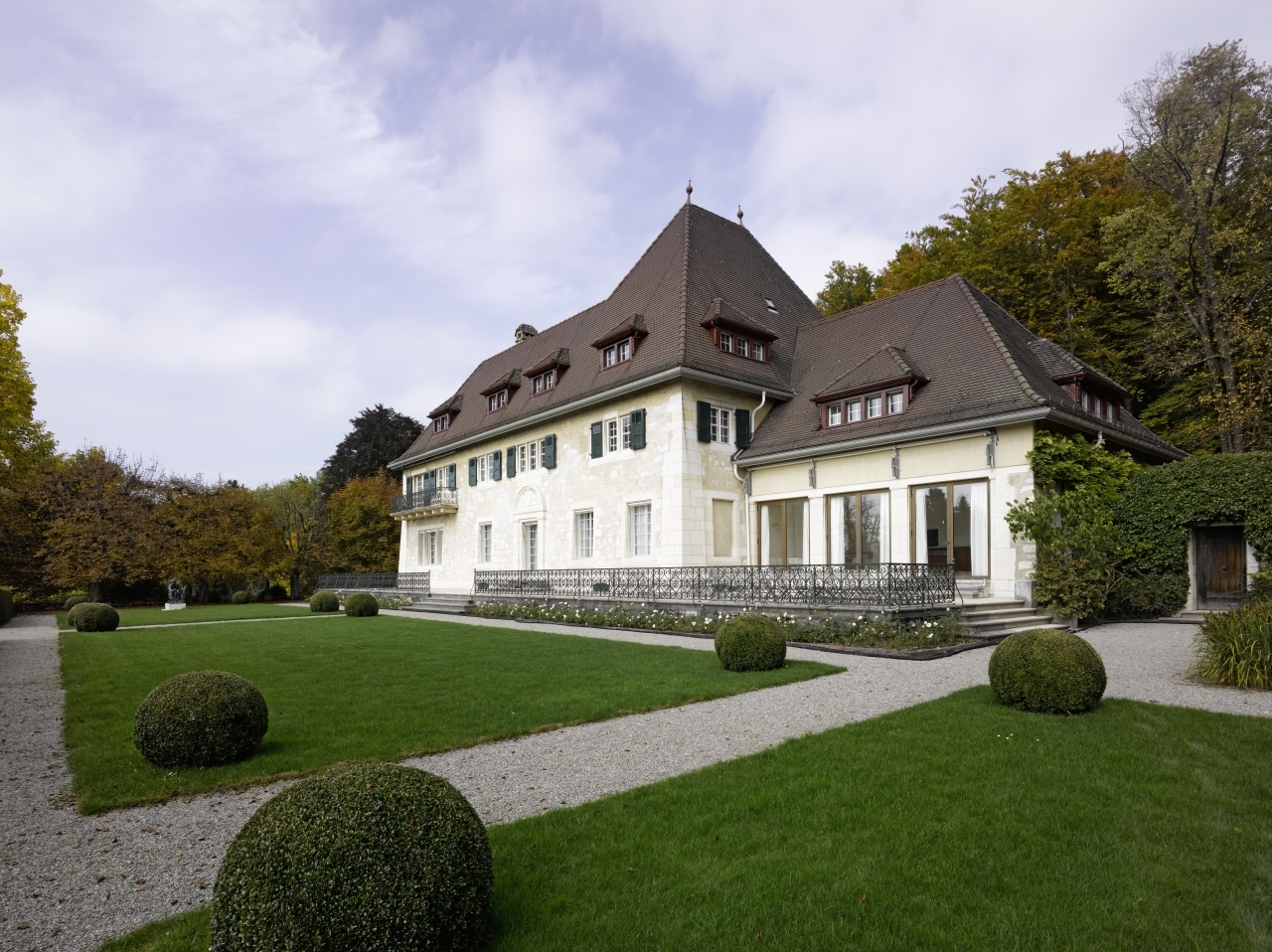 Aussenansicht